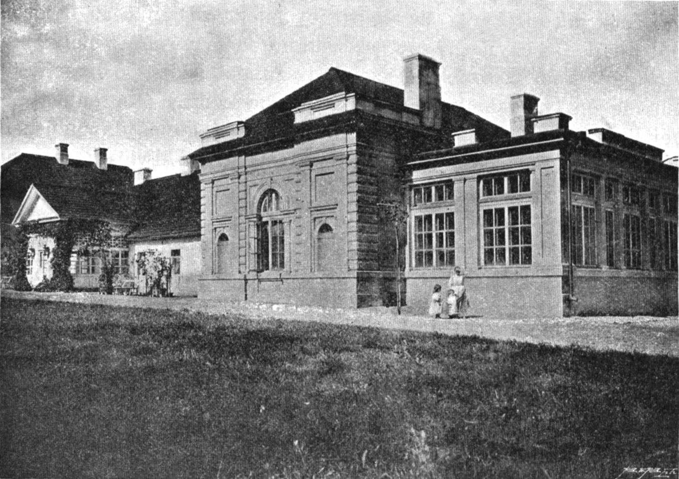 Беларуская (тарашкевіца): Яхімоўшчына (Jachimoŭščyna), сядзіба Сьвентажэцкіх (Śvientažecki)